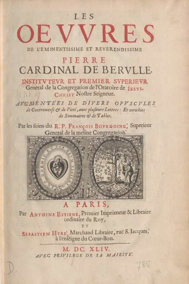 Page de titre des Oeuvres de Bérulle éditées par François Bourgoing (Paris : 1644).